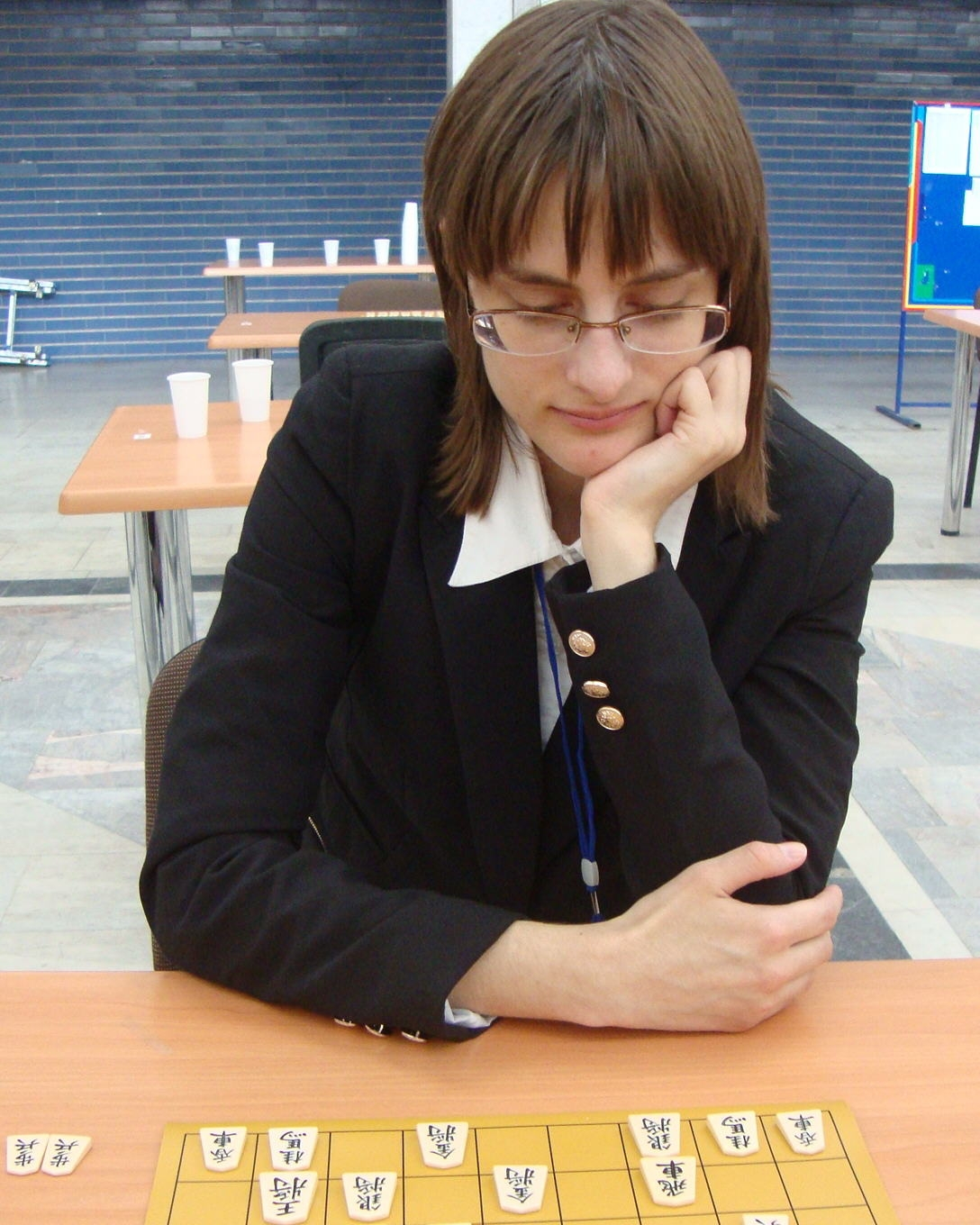 Karolina Styczynska at ESC/WOSC 2013 (Minsk)